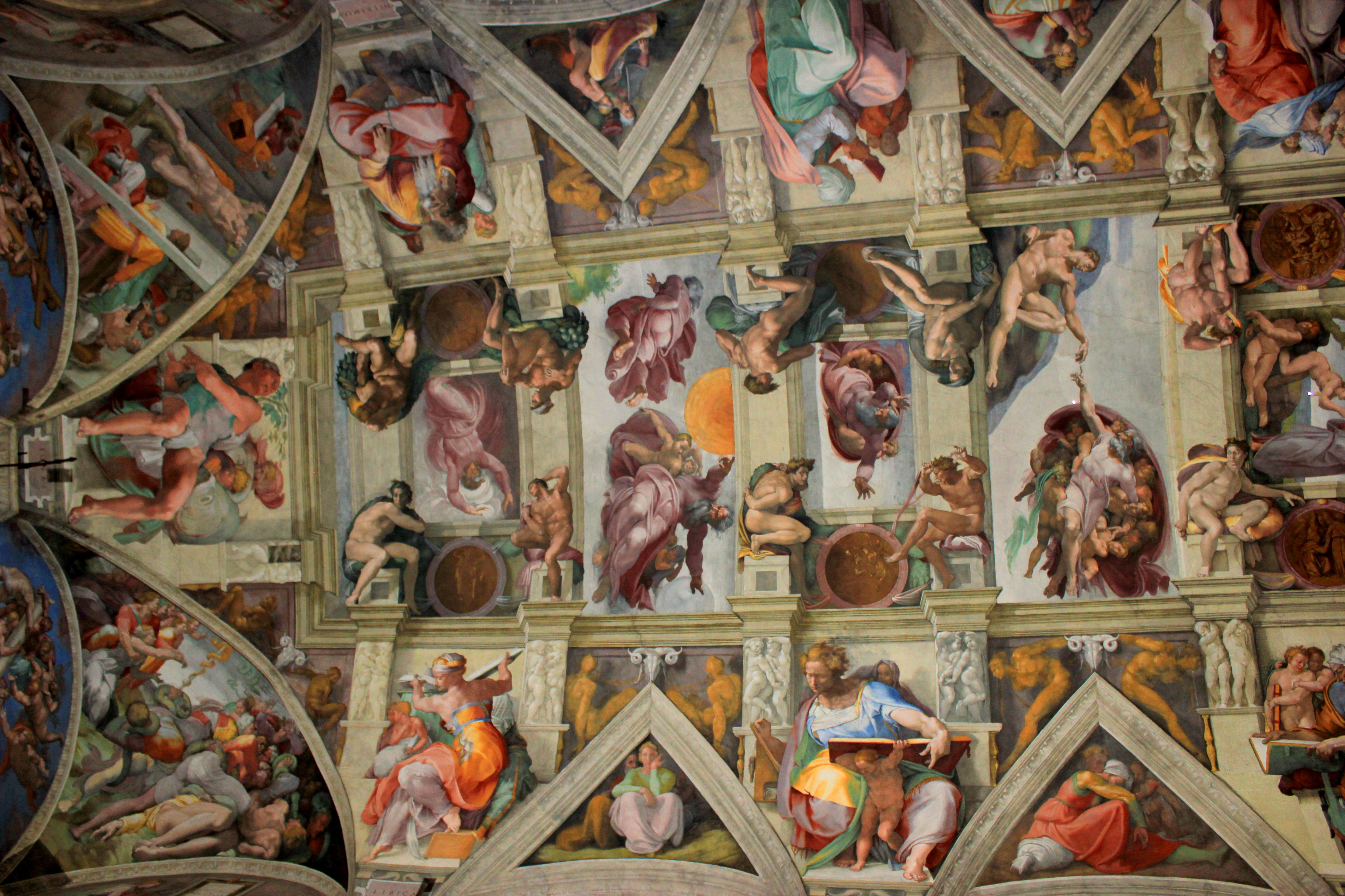 Bóveda de la Capilla Sixtina